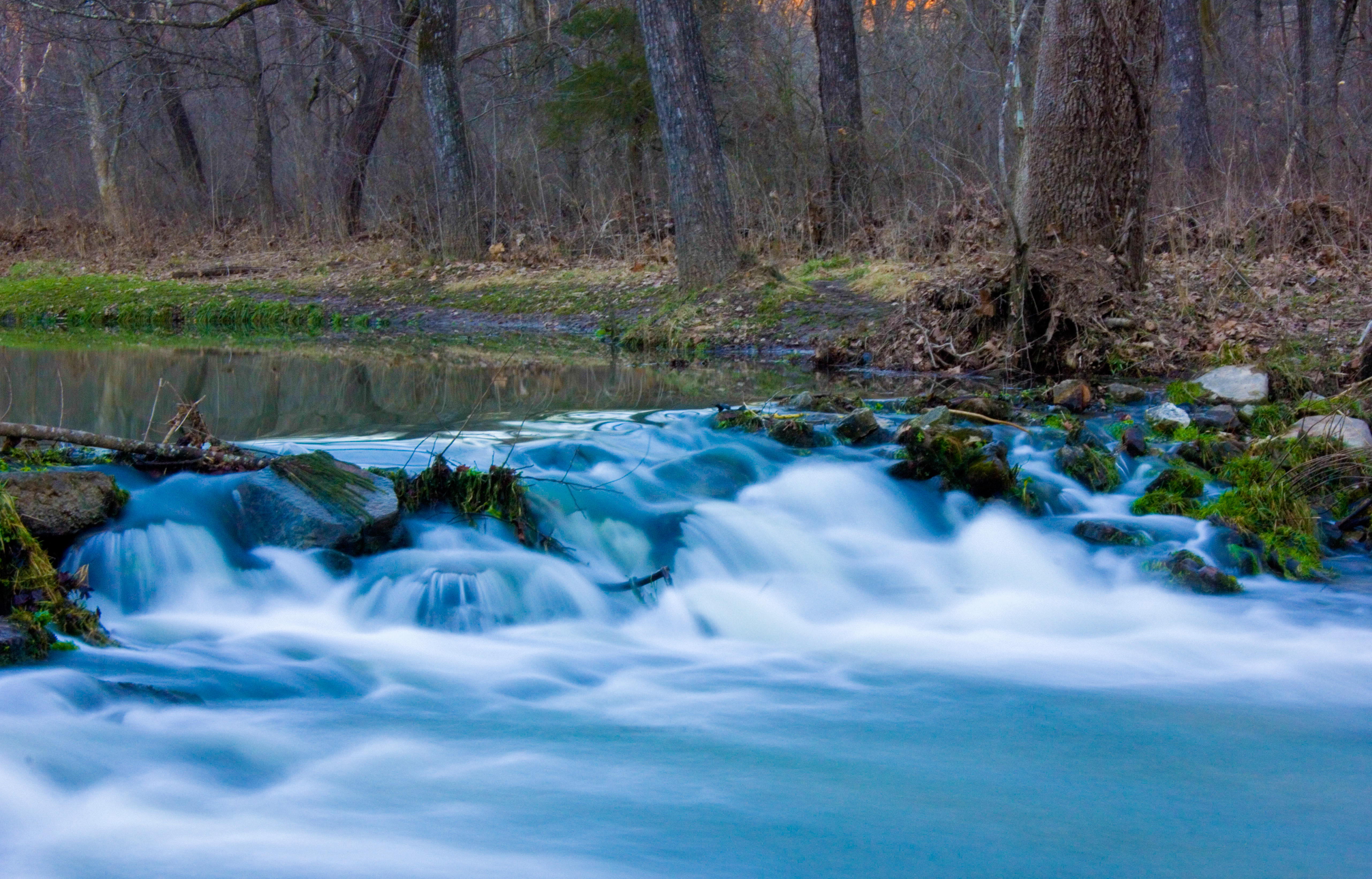 rapids-at-montauk.jpg